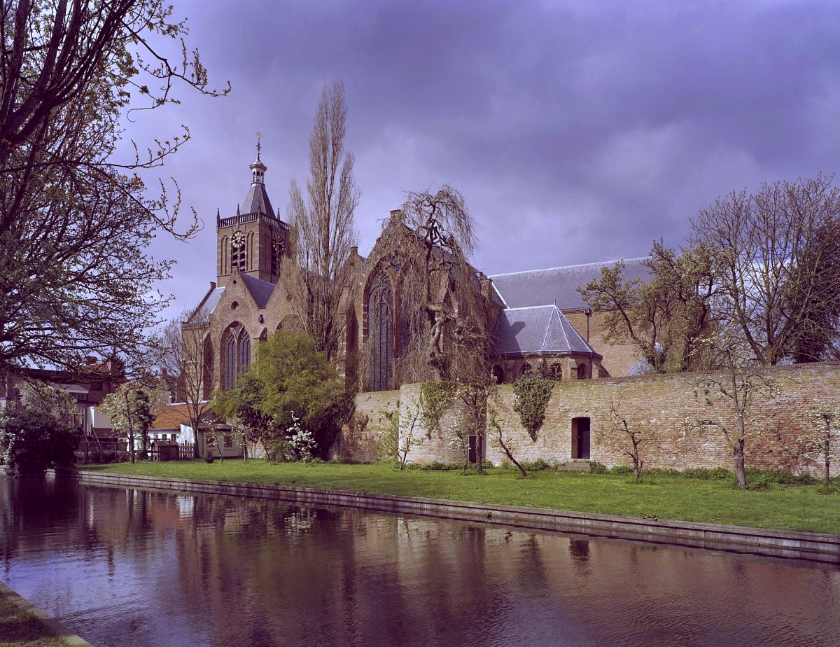 Nederlands Hervormde Kerk: Overzicht zuidgevel kerk en overzicht stadsmuur (opmerking: Gefotografeerd voor Monumenten In Nederland Zuid-Holland)